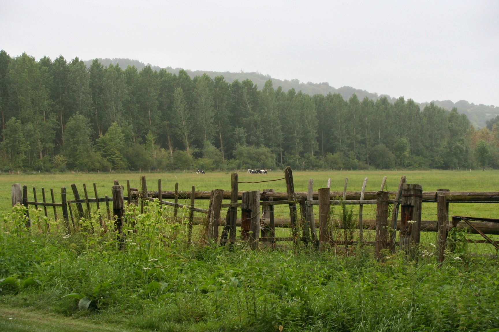 Pâturages dans la vallée de l'Epte à Amenucourt, Val-d'Oise, France